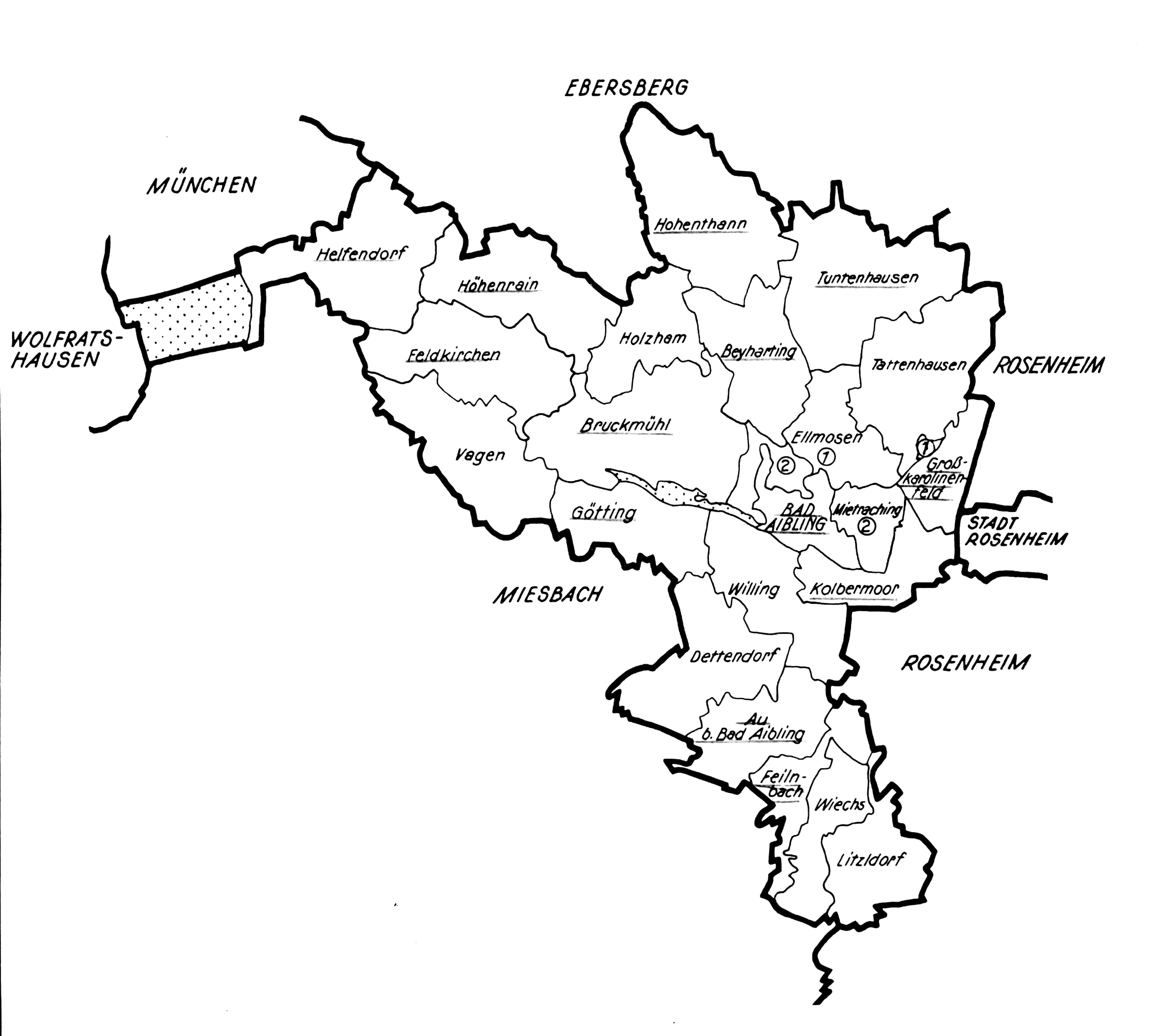 Landkreis Bad Aibling 1960/61 Gemeindegrenzen-Karte, Bayerische Gemeindestatistik